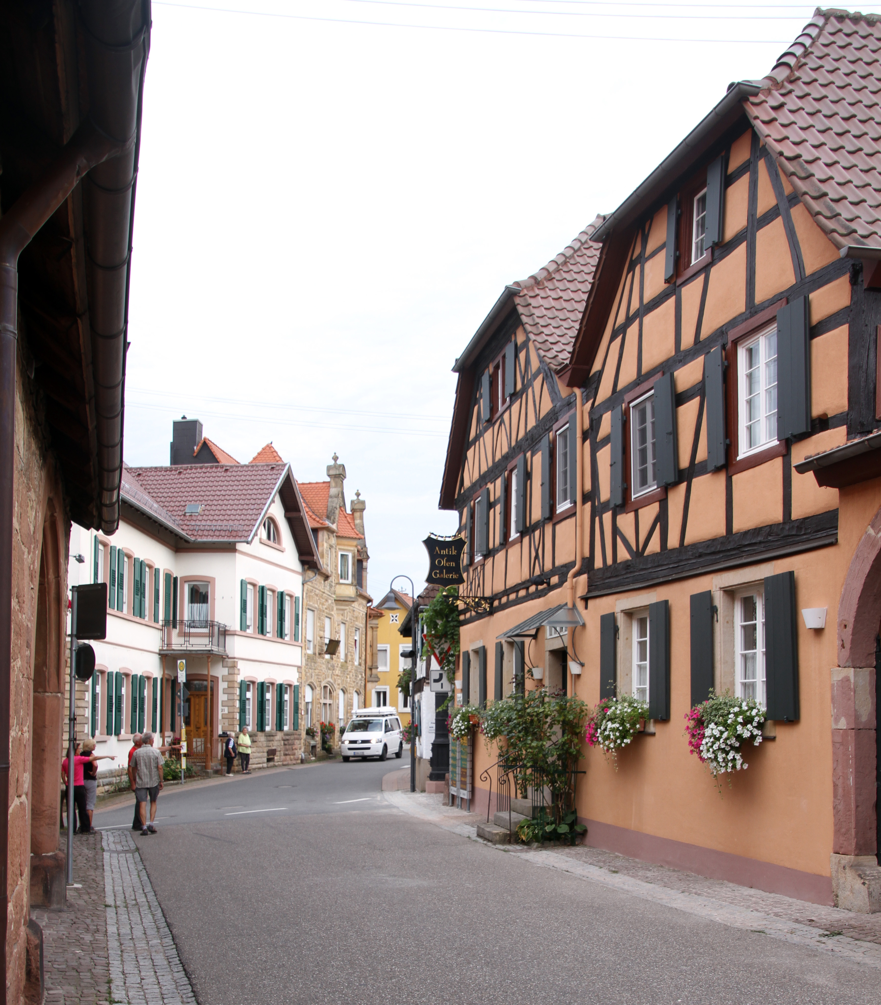 Burrweiler